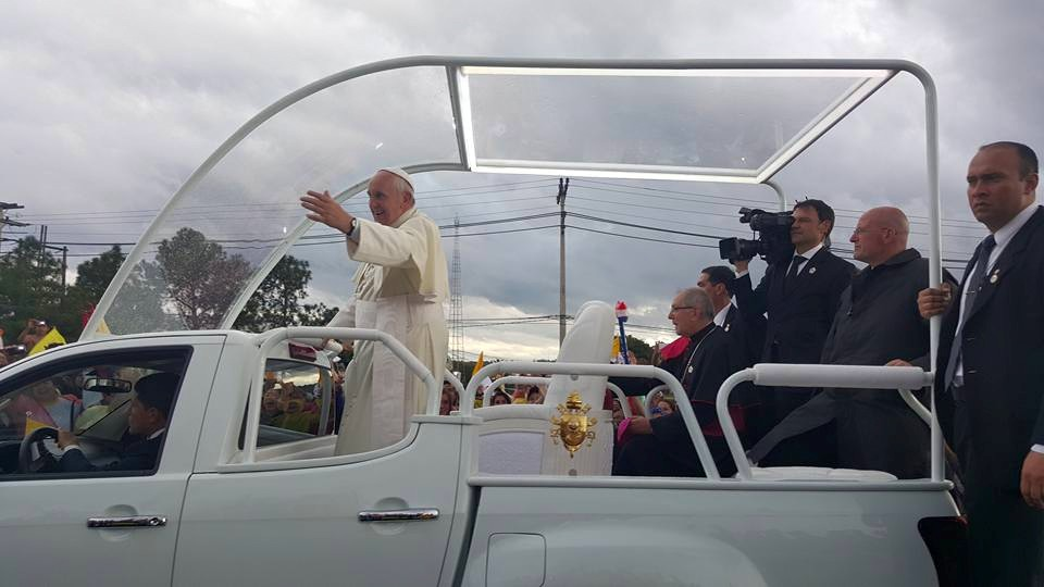 Papa Francisco durante uno de sus recorridos en el papamóvil, a poco de su arribo al país. Asunción, Paraguay.